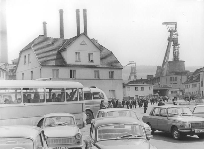 Schichtwechsel im Bergwerk Werra ADN-ZB Schaar 25.6.74 Bez. Suhl: Zum "Tag des Bergmannes der DDR" (7.7.74) Feierabend für die erste Schicht im Betriebsteil "Ernst Thälmann" Merkers. Aus 129 Städten und Gemeinden kommen die mehr als 8000 Kumpel des Kalibetriebes "Werra" im VEB Kombinat Kali. Reichsbahn, Kraftverkehr und Werksverkehr bemühen sich gemeinsam um einen pünktlichen und reibungslosen Berufsverkehr. Im sozialistischen Wettbewerb zu Ehren des 25. Jahrestages der DDR wollen die Kalikumpel den Gegenplan um 10 000t Kalidüngemittel überbieten. (Vergl. hierzu N0625-19N)